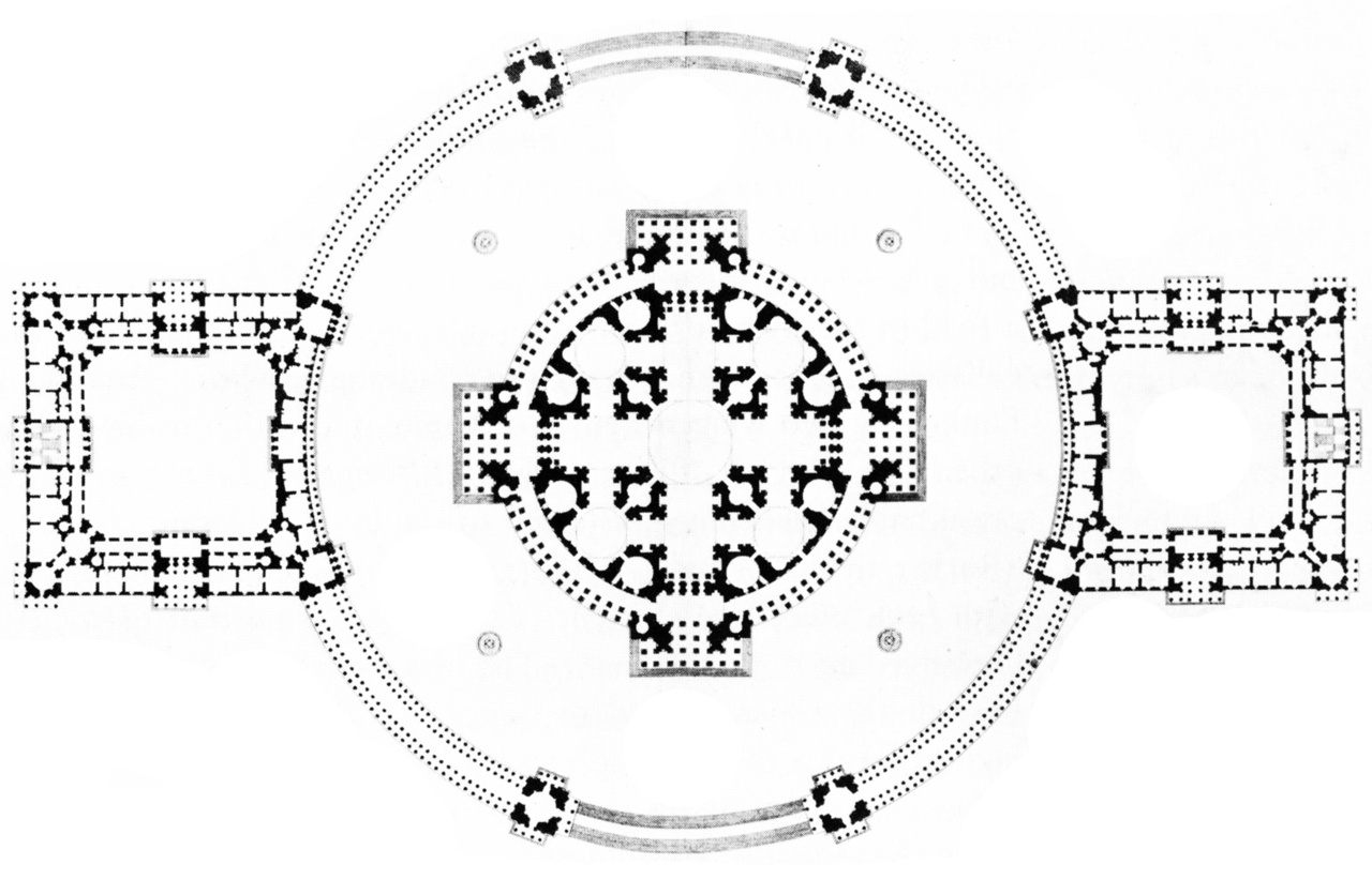 Plan du projet de Cathédrale avec deux palais (concours clémentin de l'Académie de San Luca).